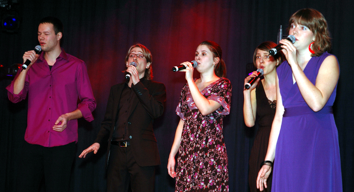 Das "WortArtEnsemble" bei einem Auftritt auf der Freiburger Kulturbörse 2009